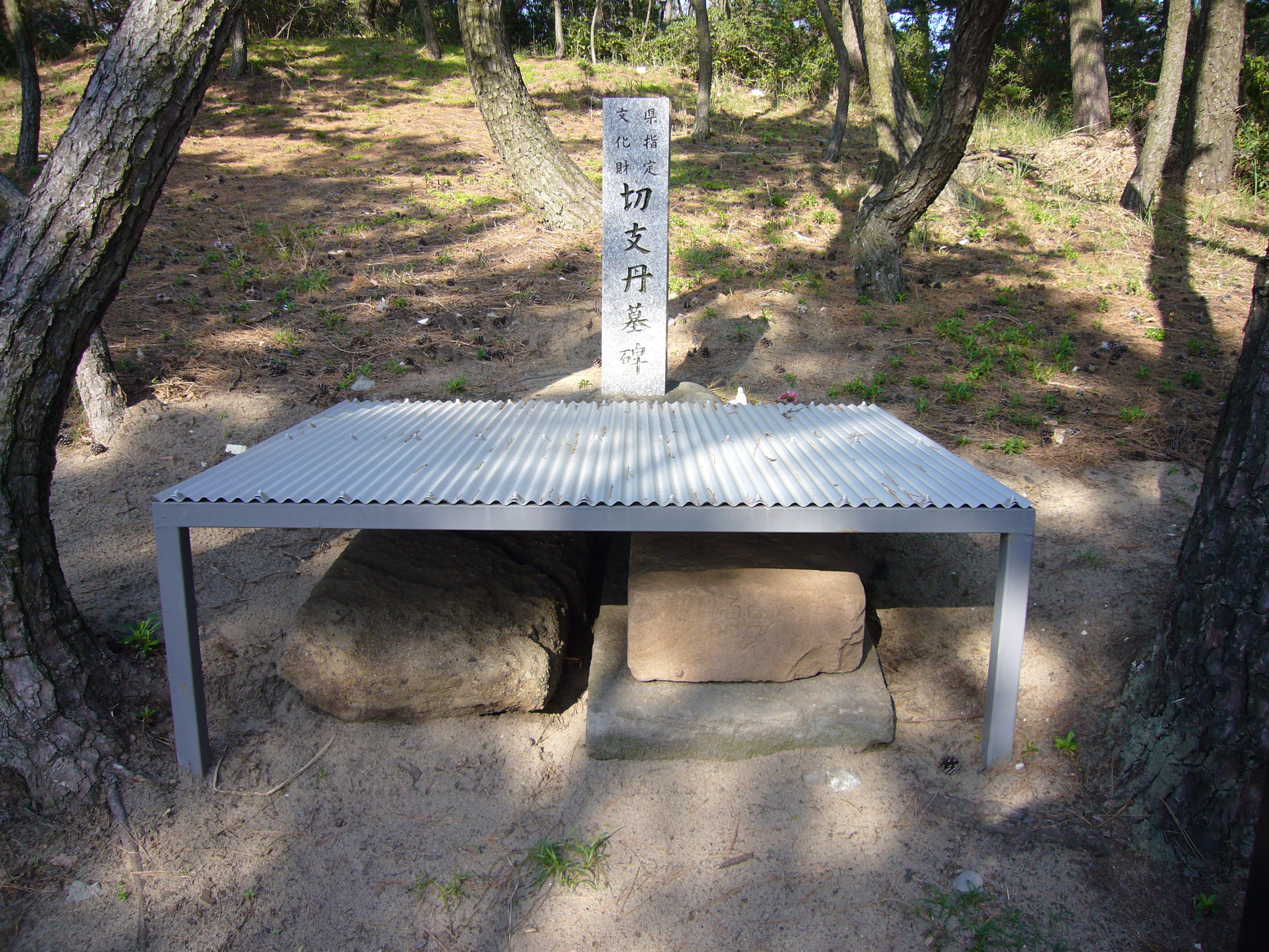 Photograph of Christian tombstones in Sahara,Kazusa,Nagasaki,Japan.